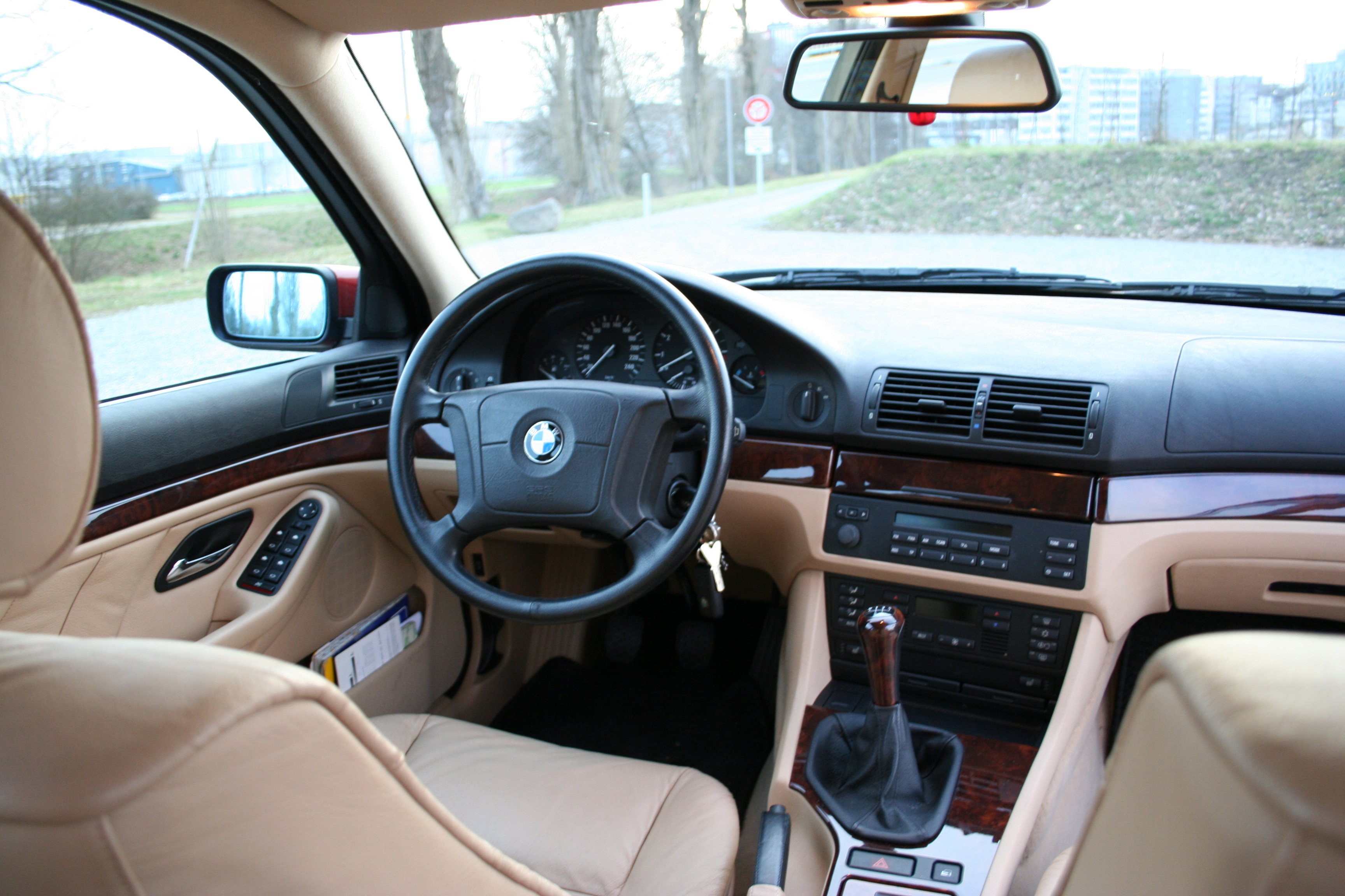 BMW E39 523i Touring (Baujahr 2000)